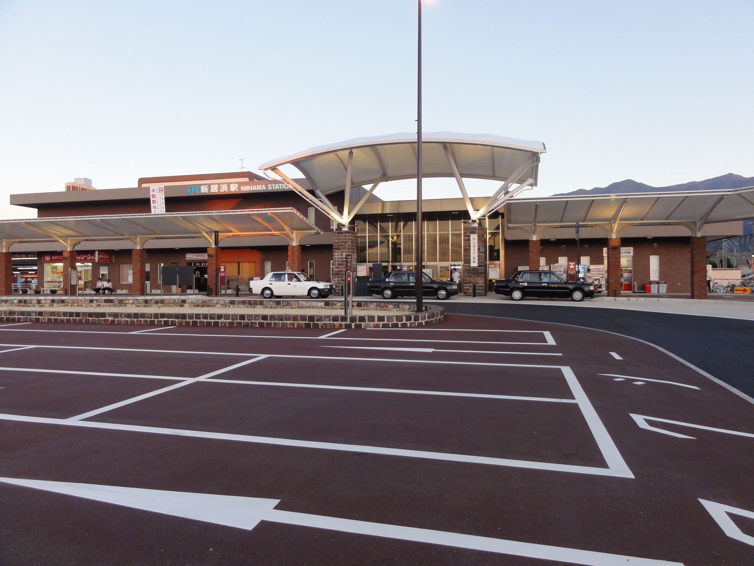 新居浜駅